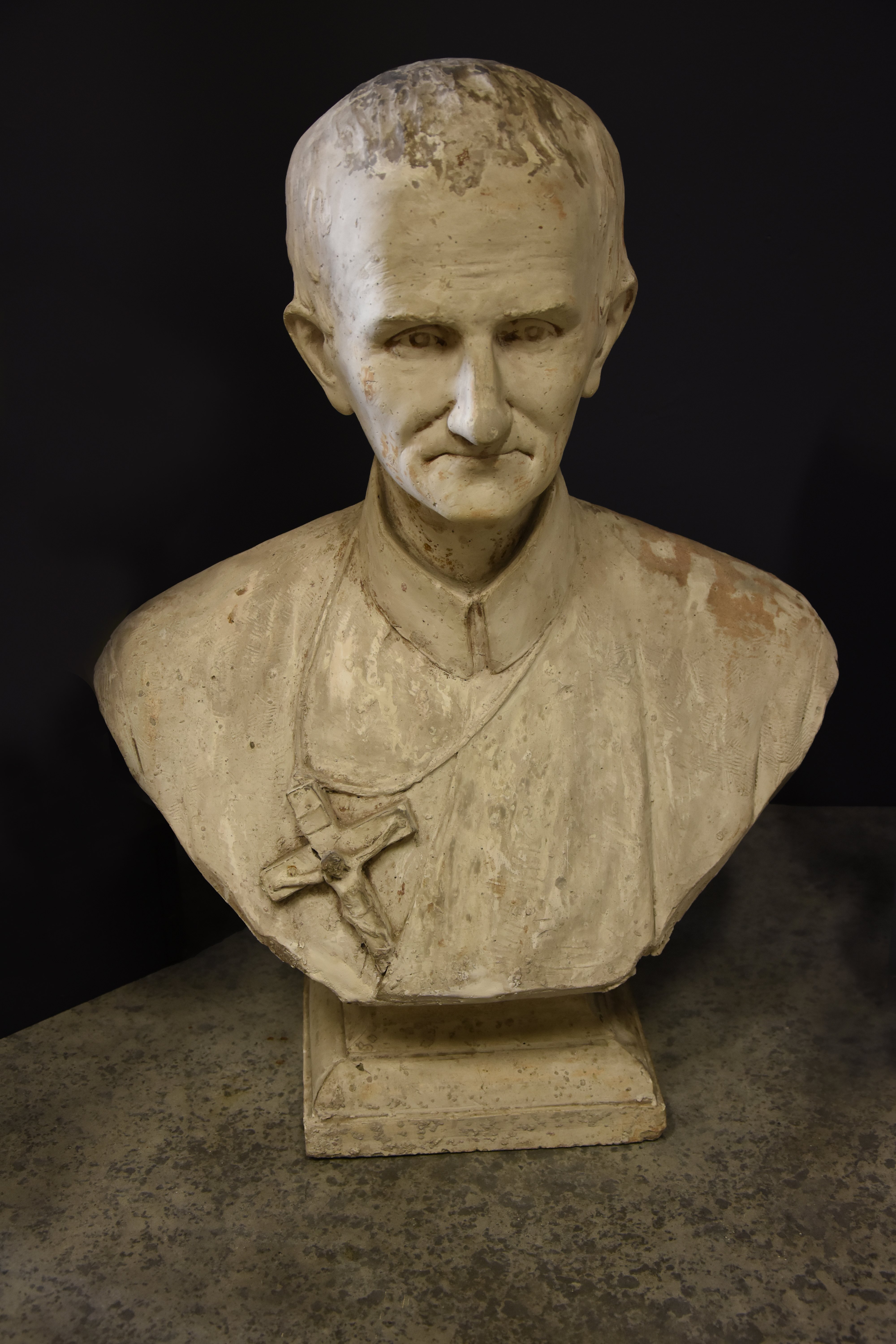 Jules Vits (1868-1935) Peerke Donders - Gemeentelijk Museum Melle - België